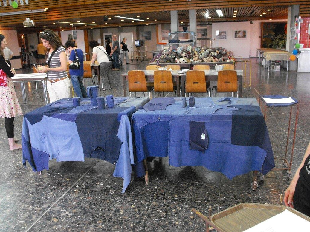 תערוכה: "זמן קיבוץ - חדר אוכל כמשל".